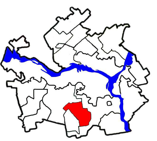 Сурсько-Литовська сільська рада, Дніпропетровський район